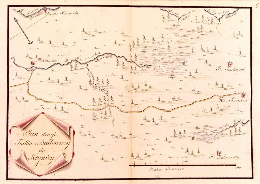 Беларуская (тарашкевіца): Плян гасьцінцу зь Белавежы ў Крыніцу з прыватных збораў Станіслава Аўгуста Панятоўскага. Захоўваецца ў Archiwum Głównym Akt Dawnych w Warszawie.